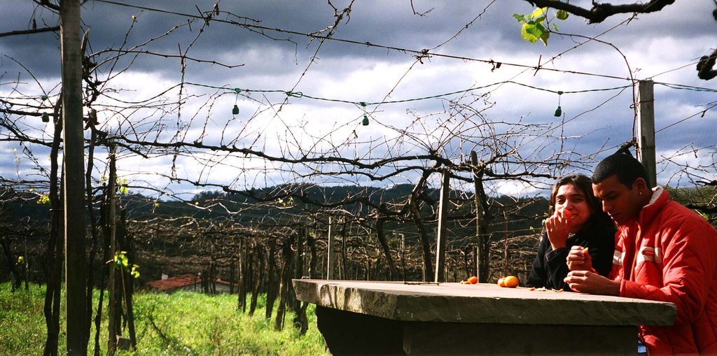 Isso mesmo. Viajamos na entresafra da uva. Por lá, nada de uva. Nesse dia percorremos as vinícolas (Casa Valduga, Miolo, Aurora, Cave de Pedra, Casa de Madeira) da região de Bento Gonçalves, no Rio Grande do Sul. Onde a desgutação era de graça, lá estávamos. Foi tal de prosecco pra lá, espumante pra cá. E outros que nem sabia falar o nome. " É de graça? Então, vou provar." No fim do dia, a Cris colheu as frutinhas e as comemos curtindo o visual. Data: 12/07/2005 Quer comentar as fotos e não tem conta no Flickr e - Entre com o login: Senha: fotografia